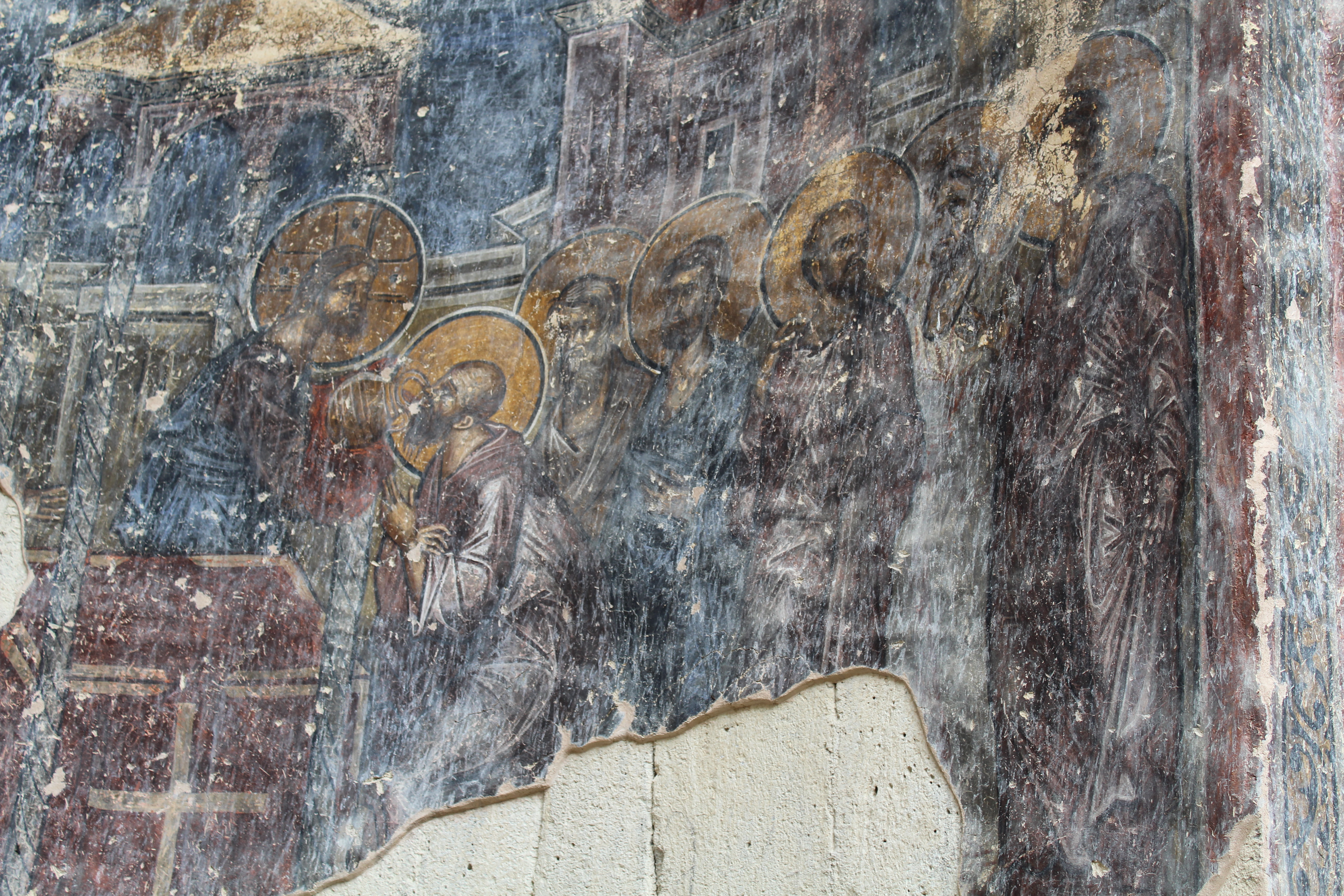 გუმბათიანი ეკლესია